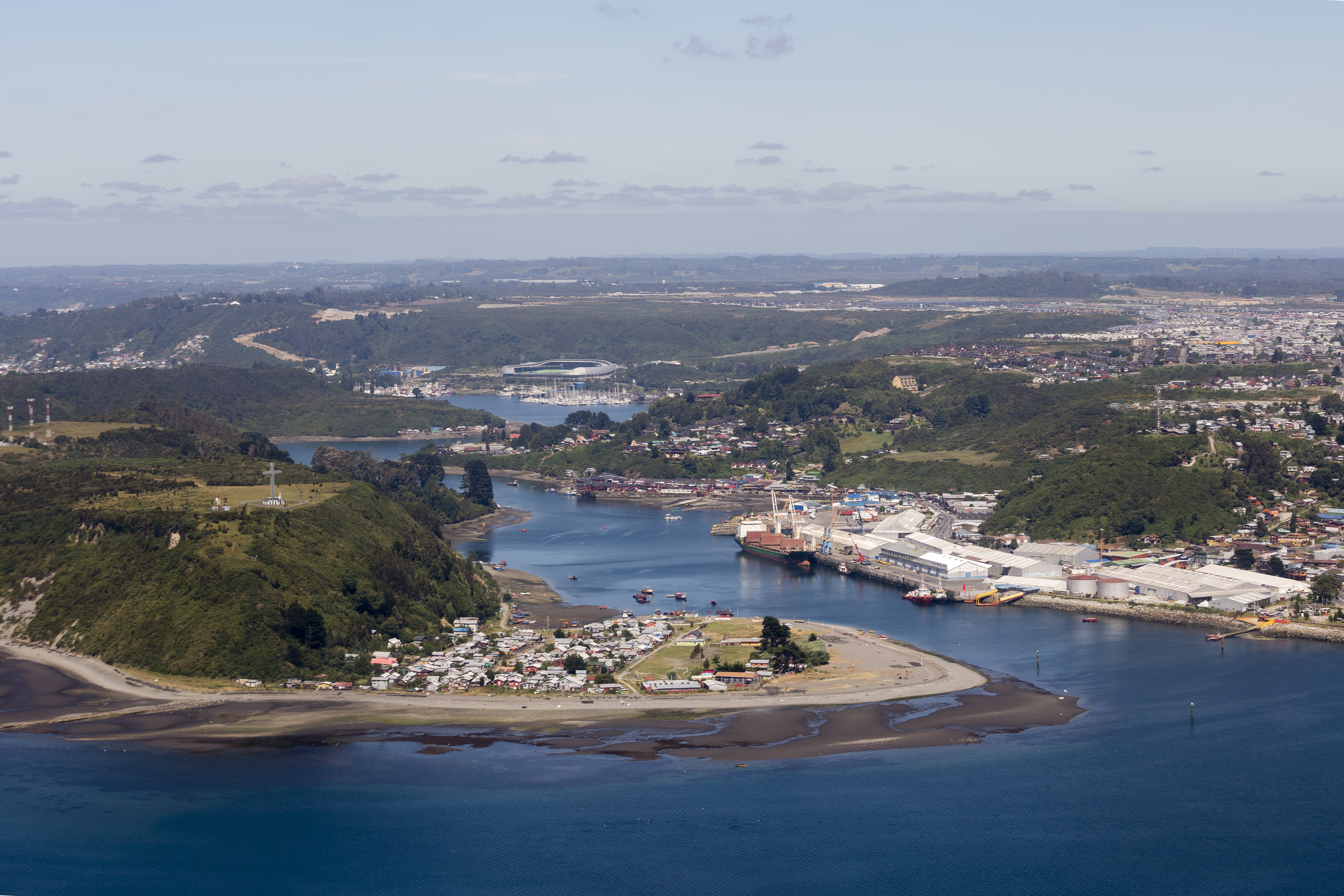 Canal de Tenglo, Puerto Montt